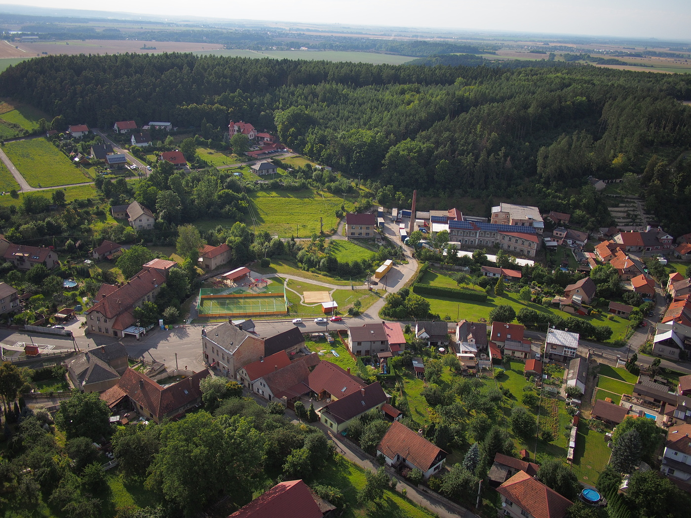 Pohled na sportovne spolecensky areal a byvalou tovarnu Botana